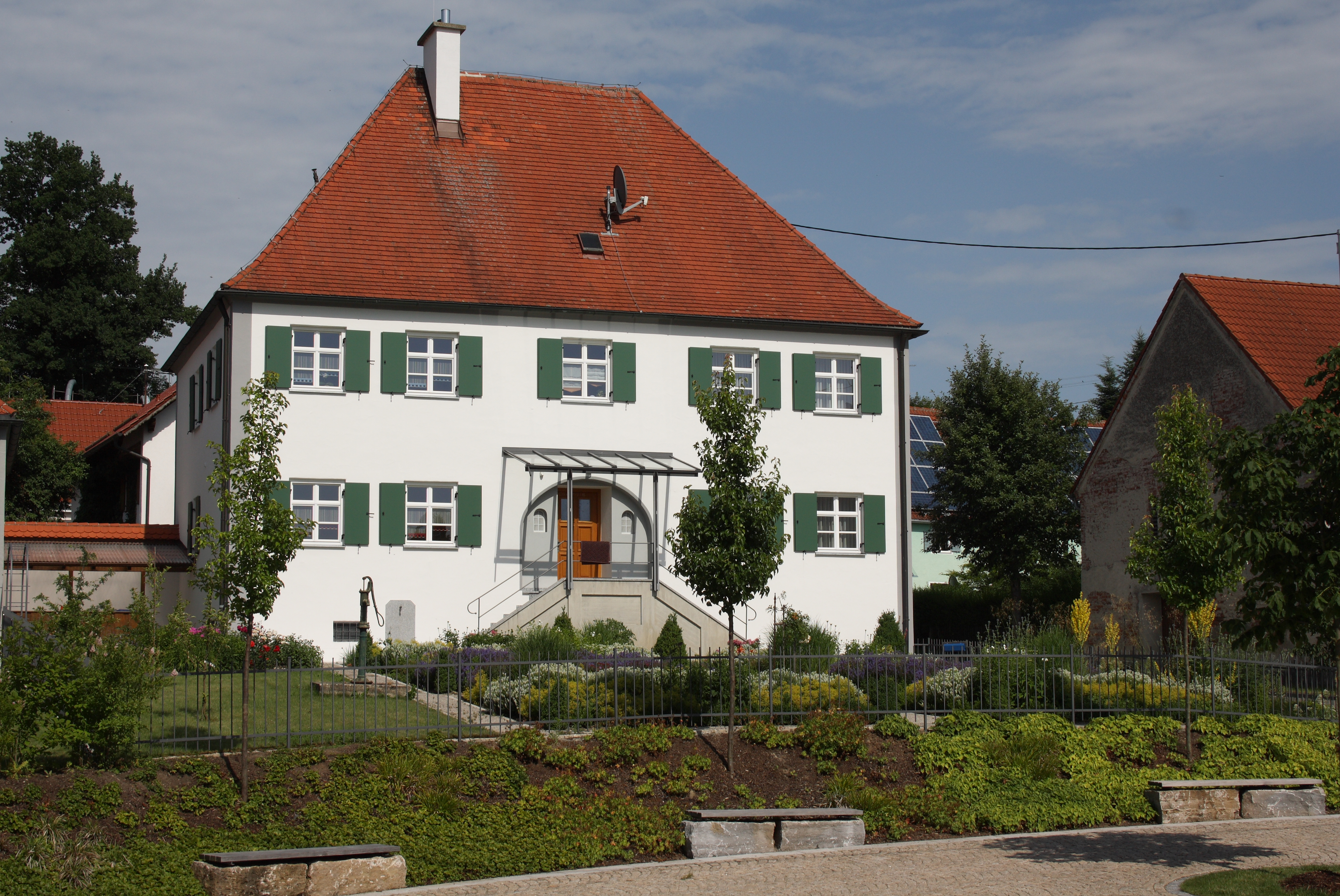 Gebäude in Münsterhausen im Landkreis Günzburg (Bayern)